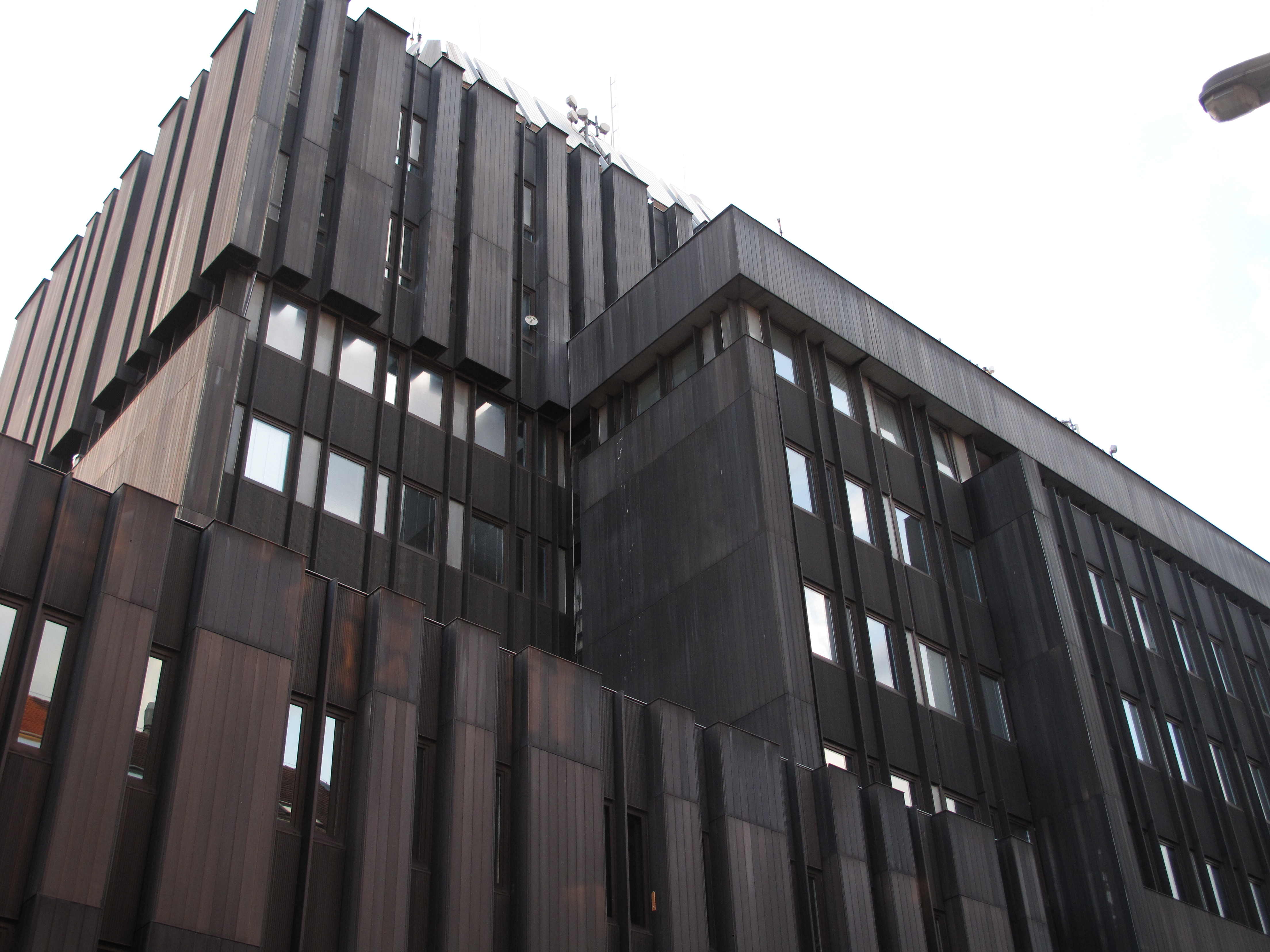 Budova Centrálního dispečinku městské dopravy Dopravního podniku hlavního města Praha v pražské ulici Na Bojišti 1457/15.